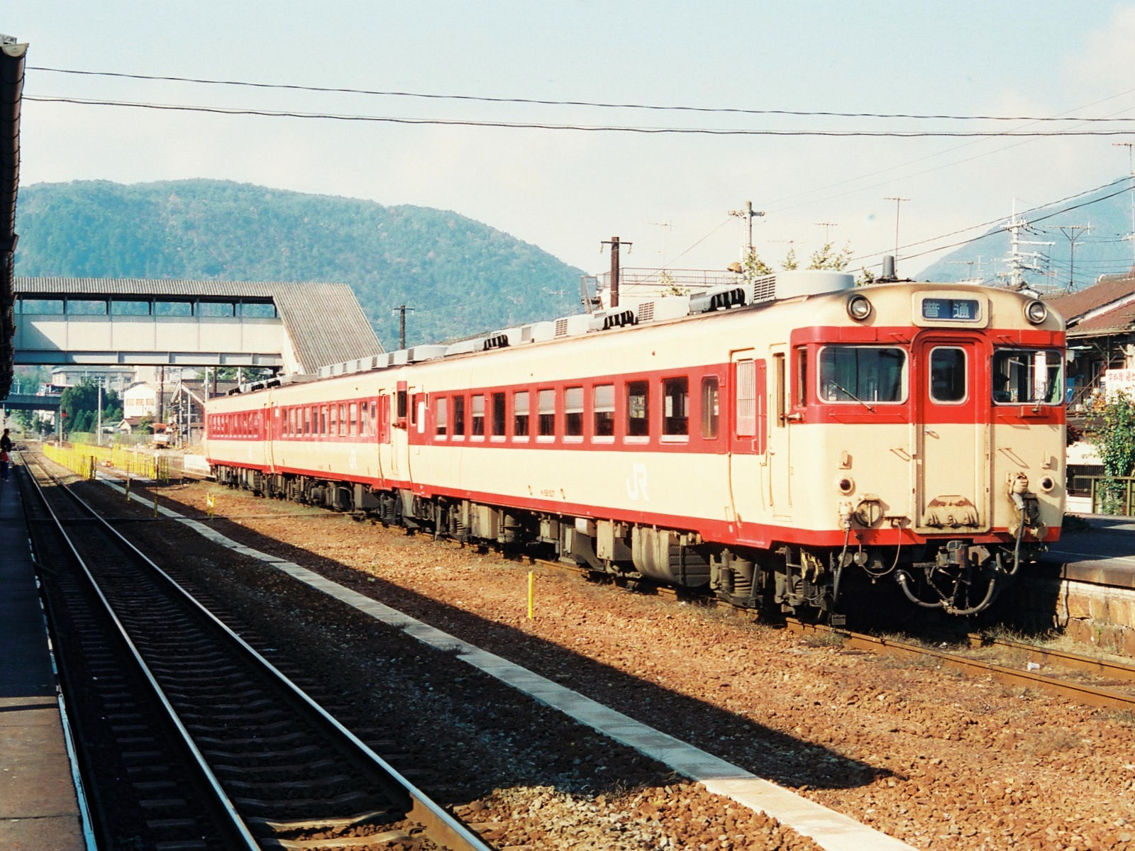 京都府京都市右京区にある嵯峨駅（現・嵯峨嵐山駅）構内の様子。